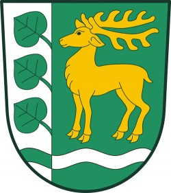 Lhánice